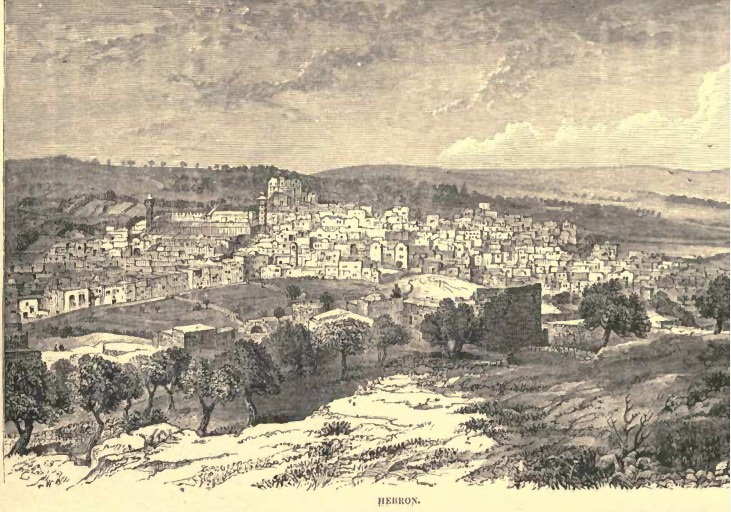 Hebron 1886